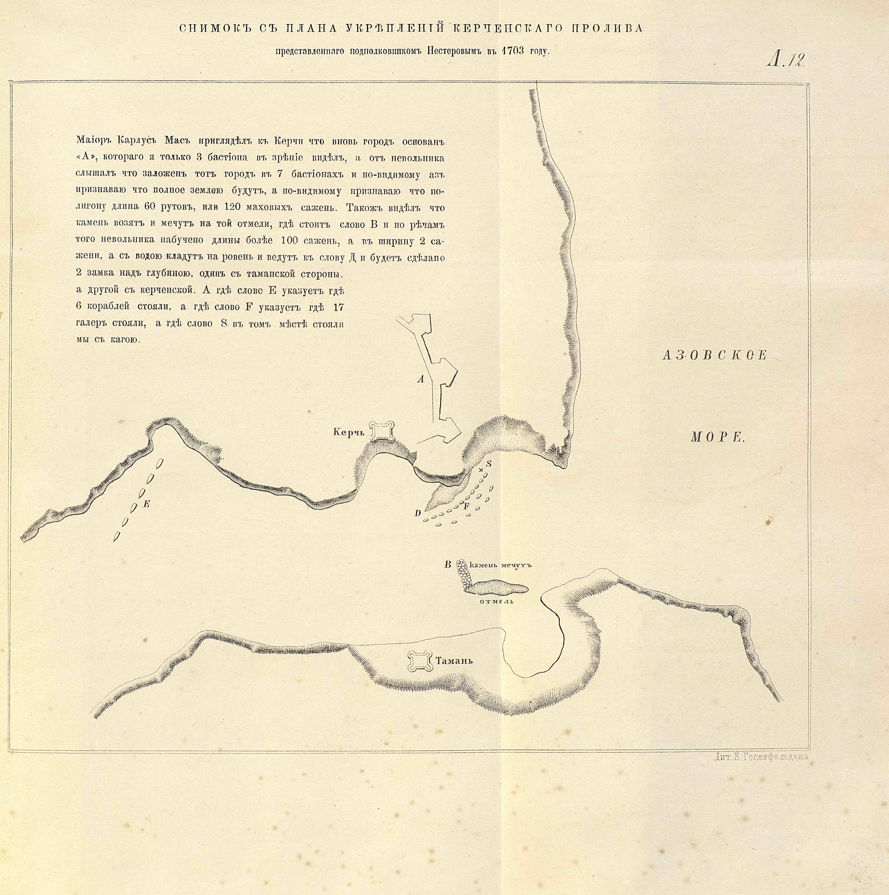 Снимок с плана укреплений Керченского пролива, представленного подполковником Нестеровым в 1703 году. Елагин С.И. "История русского флота. Период азовский". - СПб, 1864